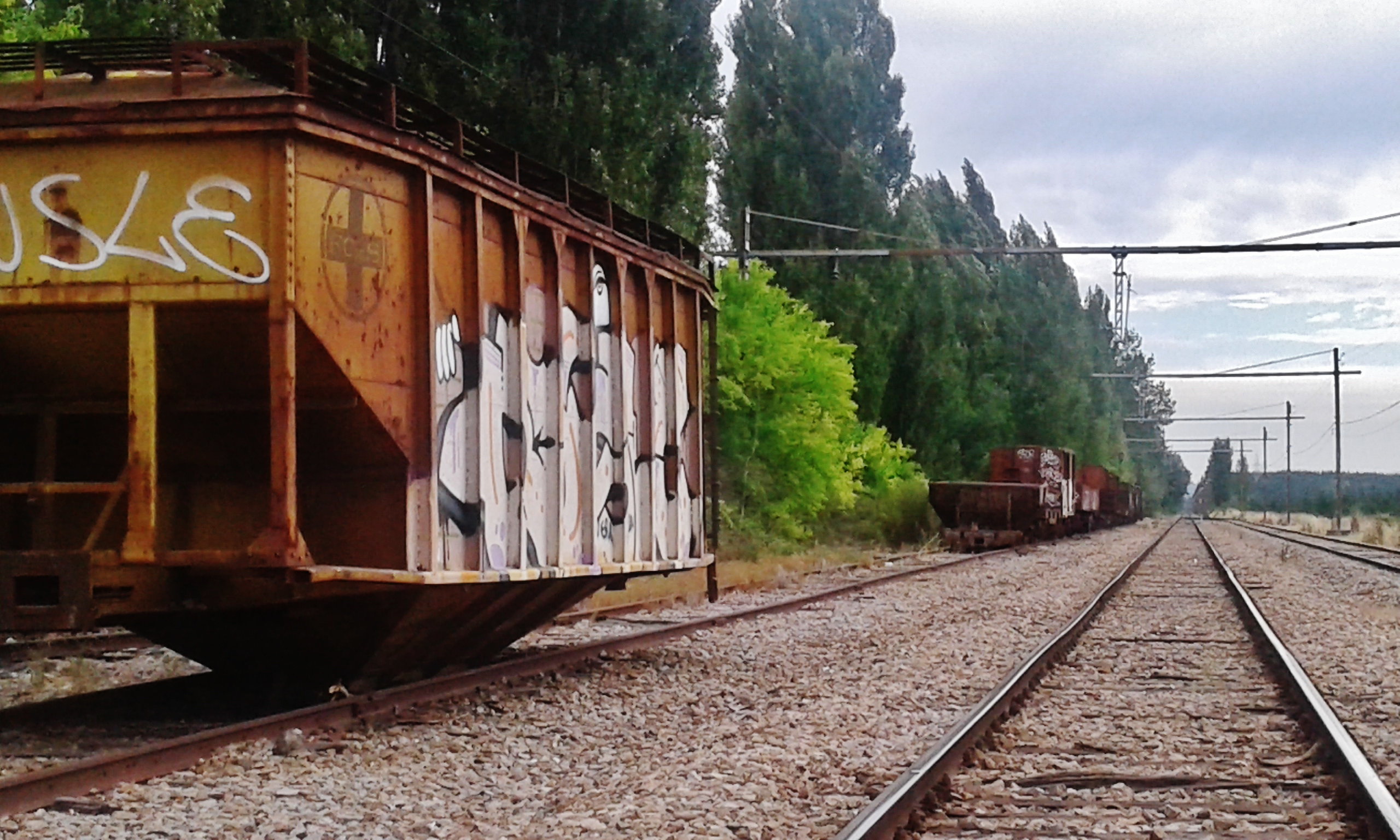 Carros de tren abandonados en Monte Águila.